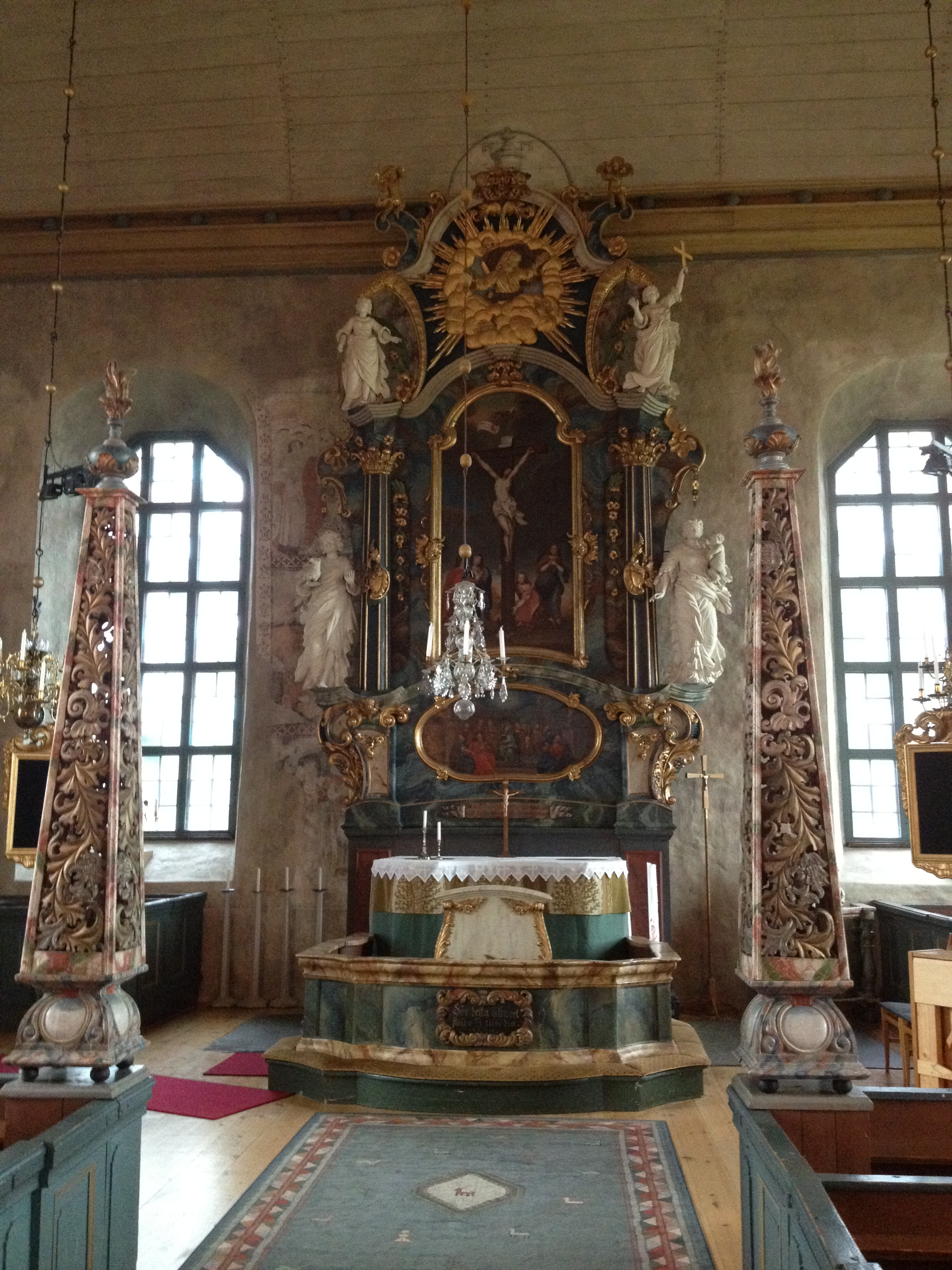 Altare i Ovikens gamla kyrka